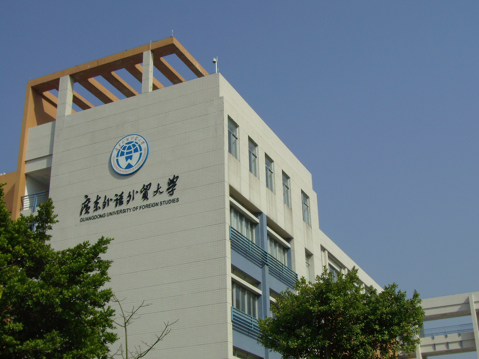 广东外语外贸大学大学城校区教学楼B栋